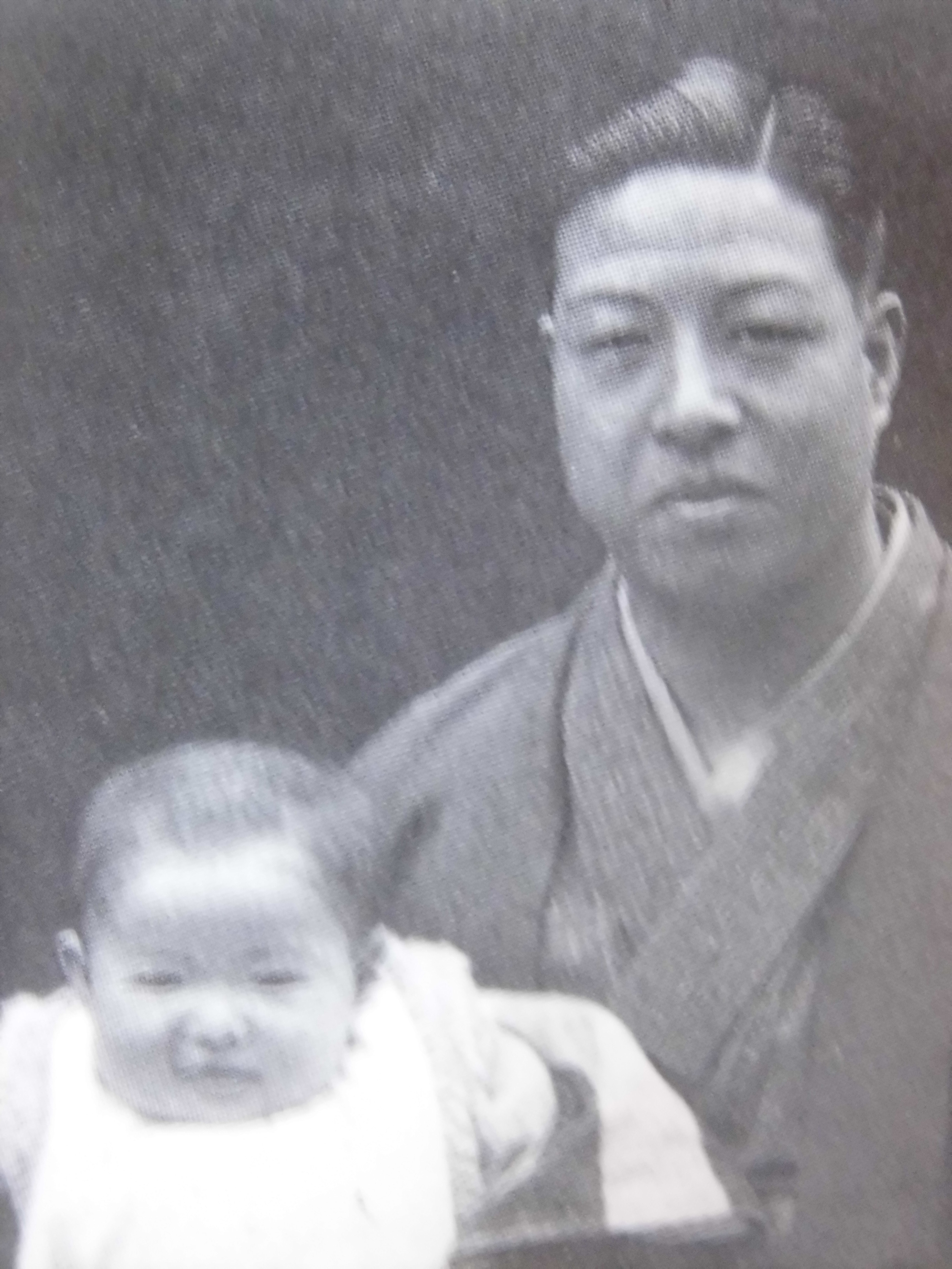 2代目坂口平兵衛と息子（Sakaguchi Heibei2 and Son）